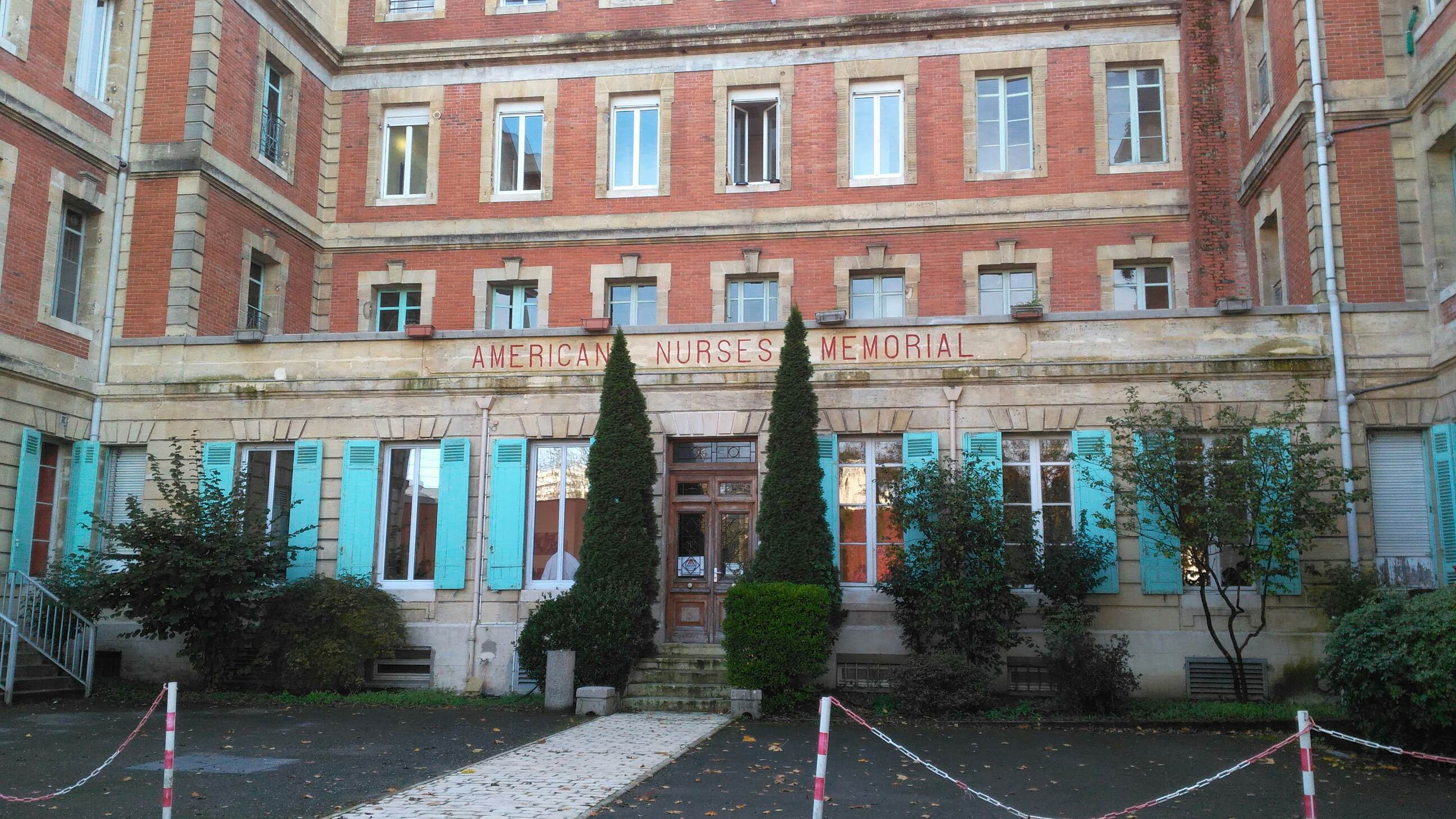 Façade nord de l'Institut Florence Nightingale, à Talence, propriété de la Fondation Bagatelle (Maison de Santé Protestante de Bordeaux), érigé en American Nurses Memorial lors de sa construction en 1921.